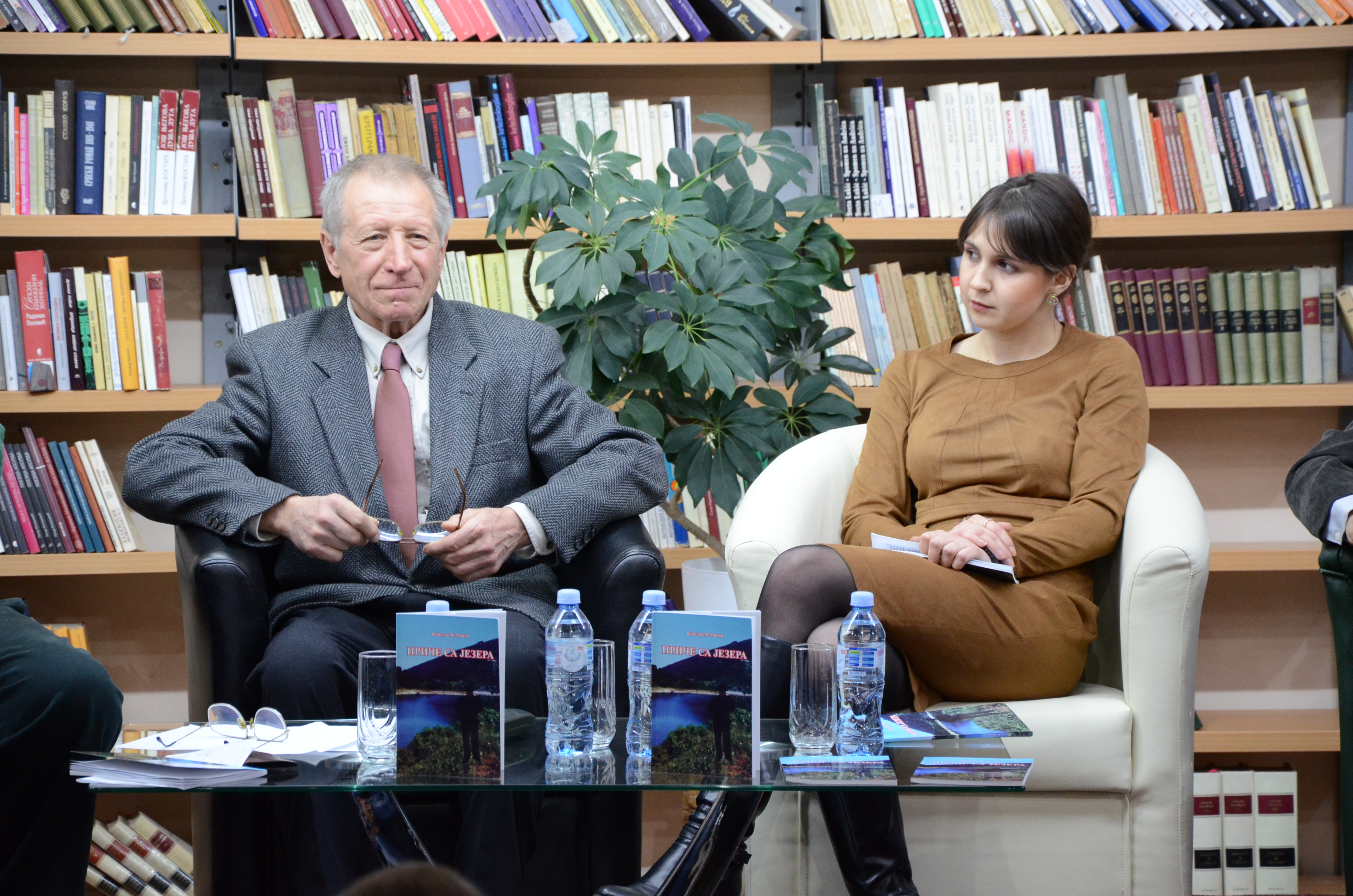 Vojislav Minič, pisac i Danica Stanković, glumica na promociji knjige u Narodnoj biblioteci Pirot